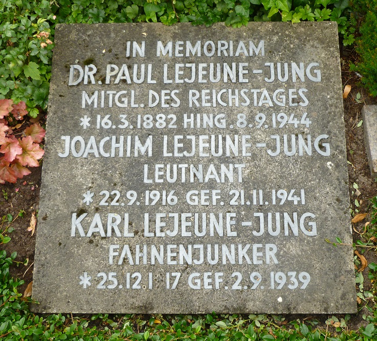 Gedenktafel für Paul Lejeune-Jung, 23.07.2011